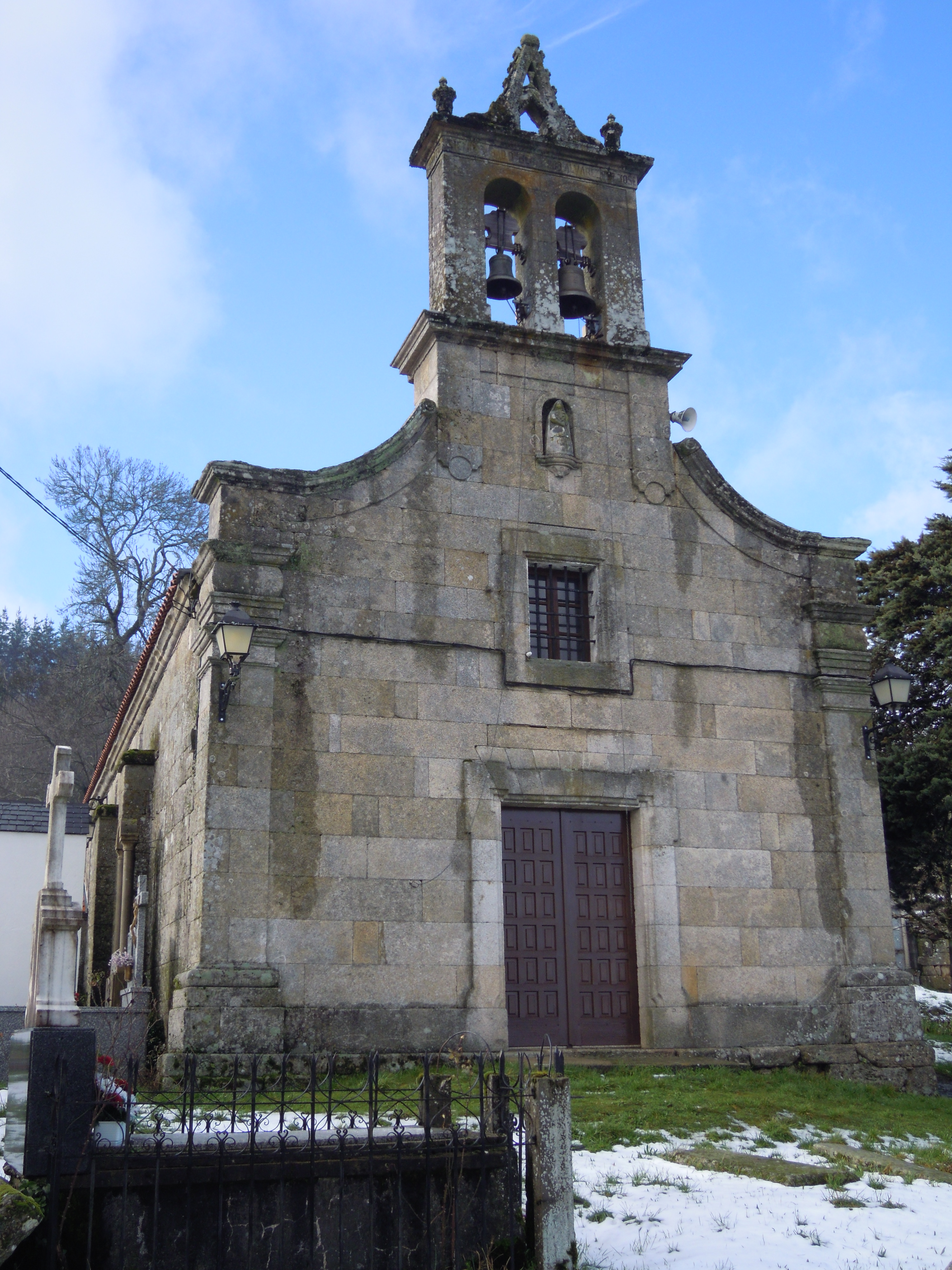 Igrexa na Trepa, en Fumaces e A Trepa (Riós).